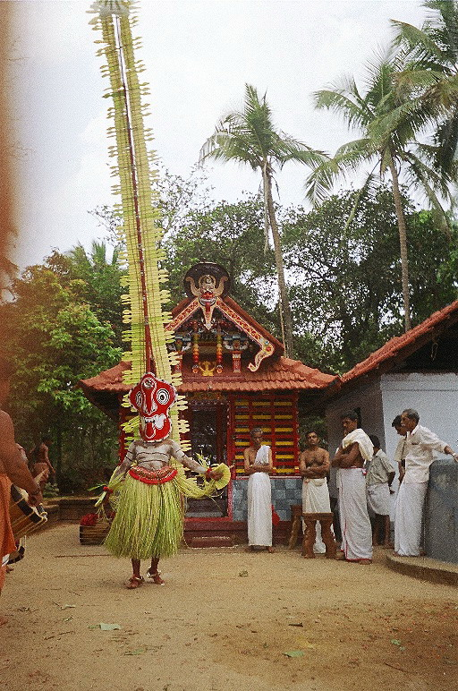 Gulikan theyyam performing. Pictured at Puthiya Mundayat Kottam, Azhikode